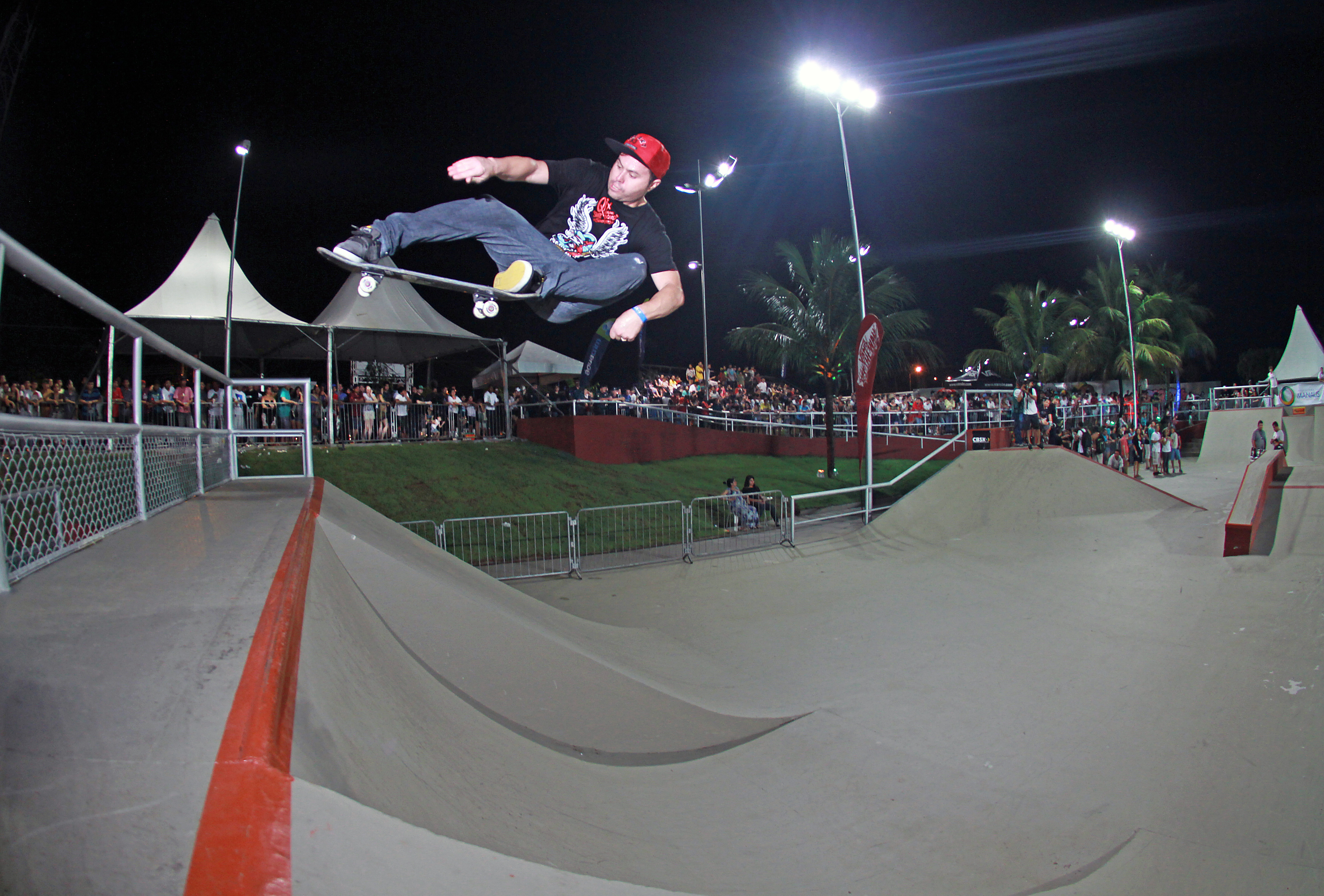 Ollie